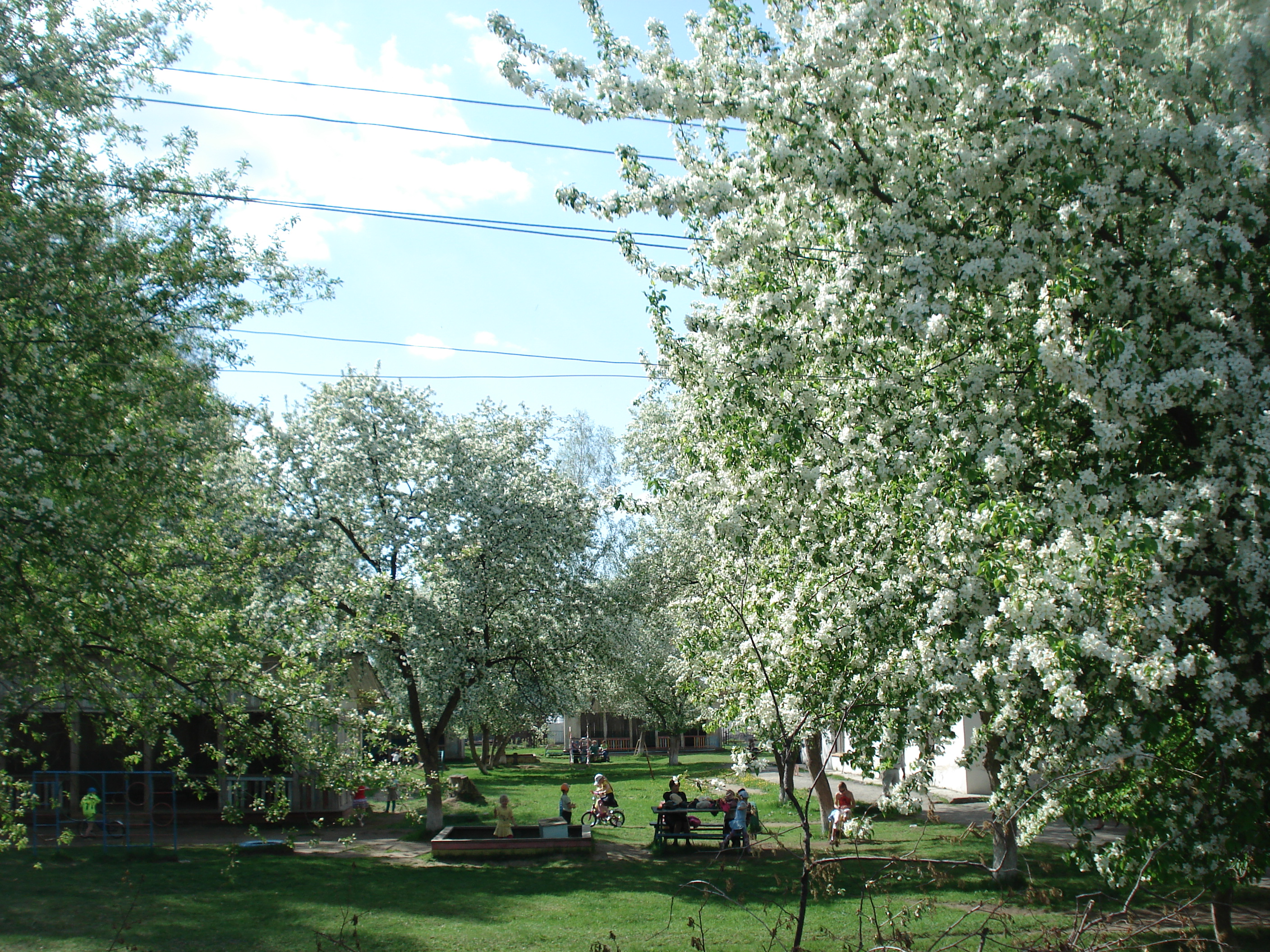 МДОУ "Детский Сад №19", п. Кедровое.